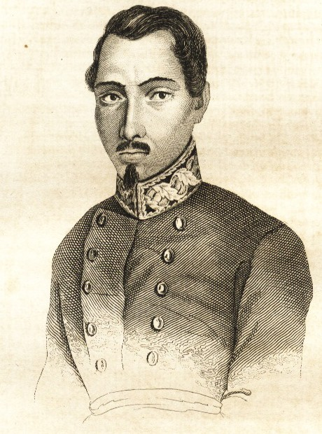 General Pardiñas (detalle)